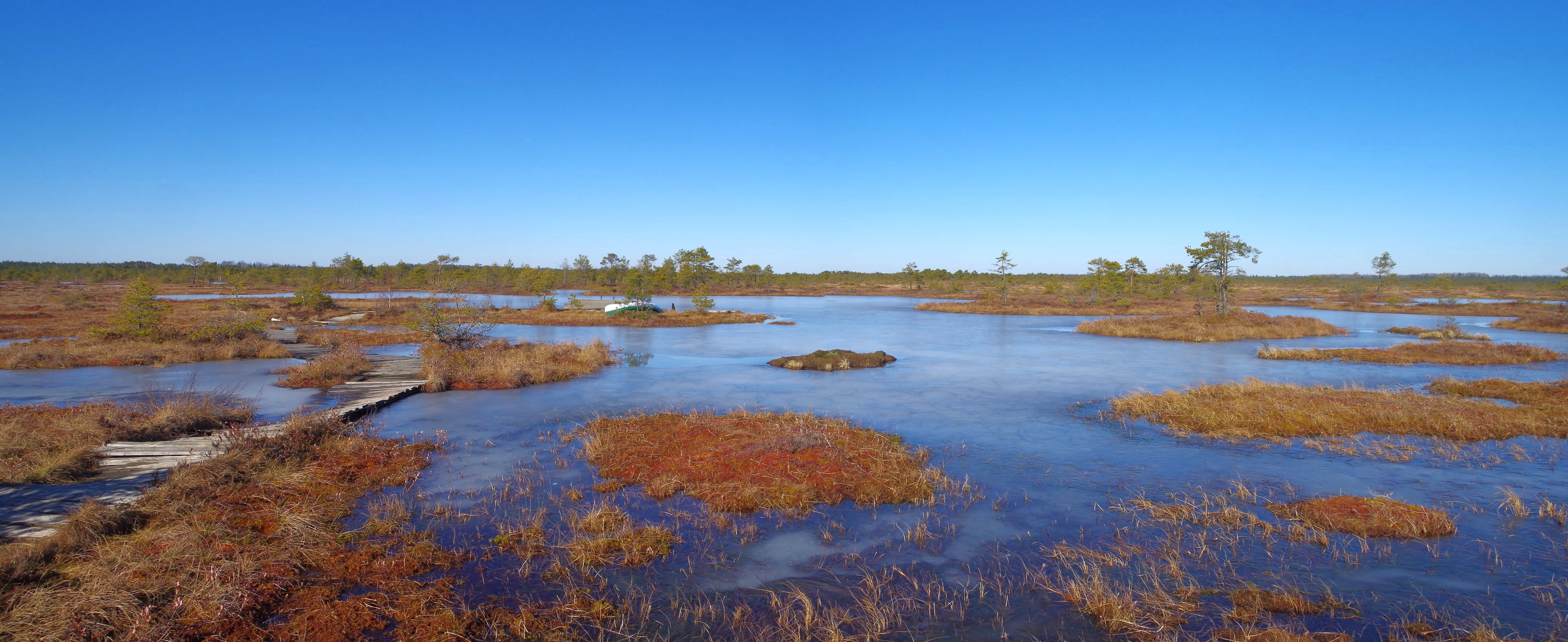 Kõnnumaa maastikukaitseala